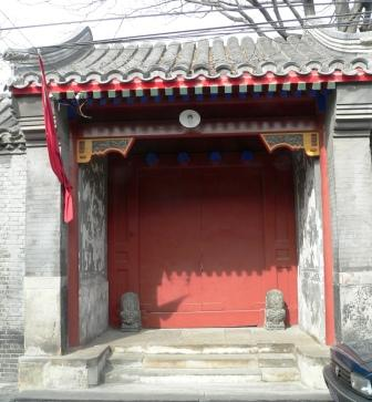 广亮大门 拍摄